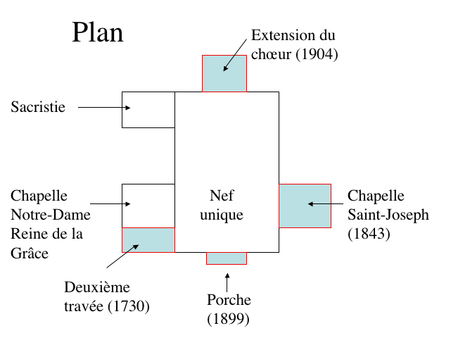 Plan de la chapelle des Capucins à Enghien